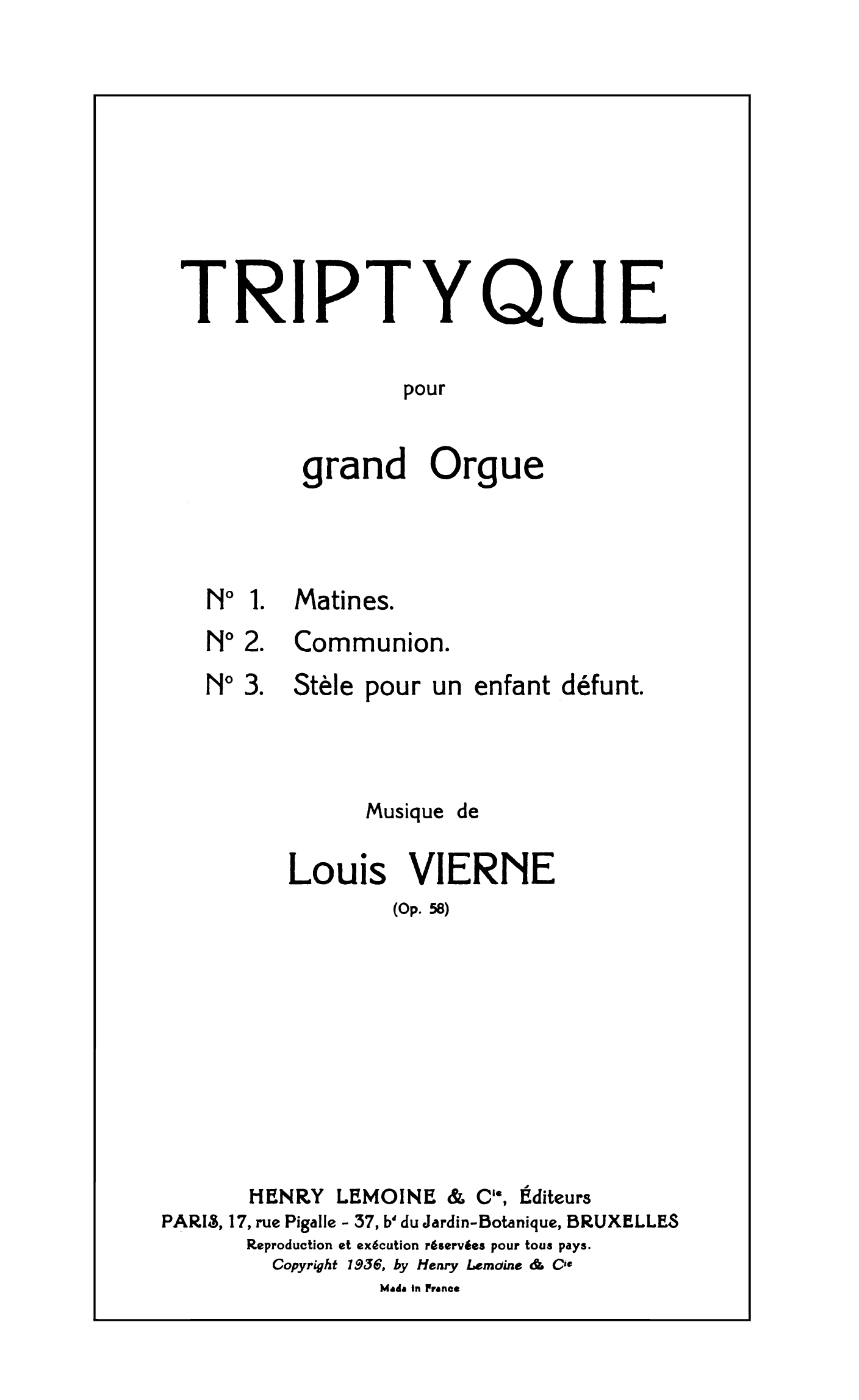 Louis Vierne, Triptyque titre